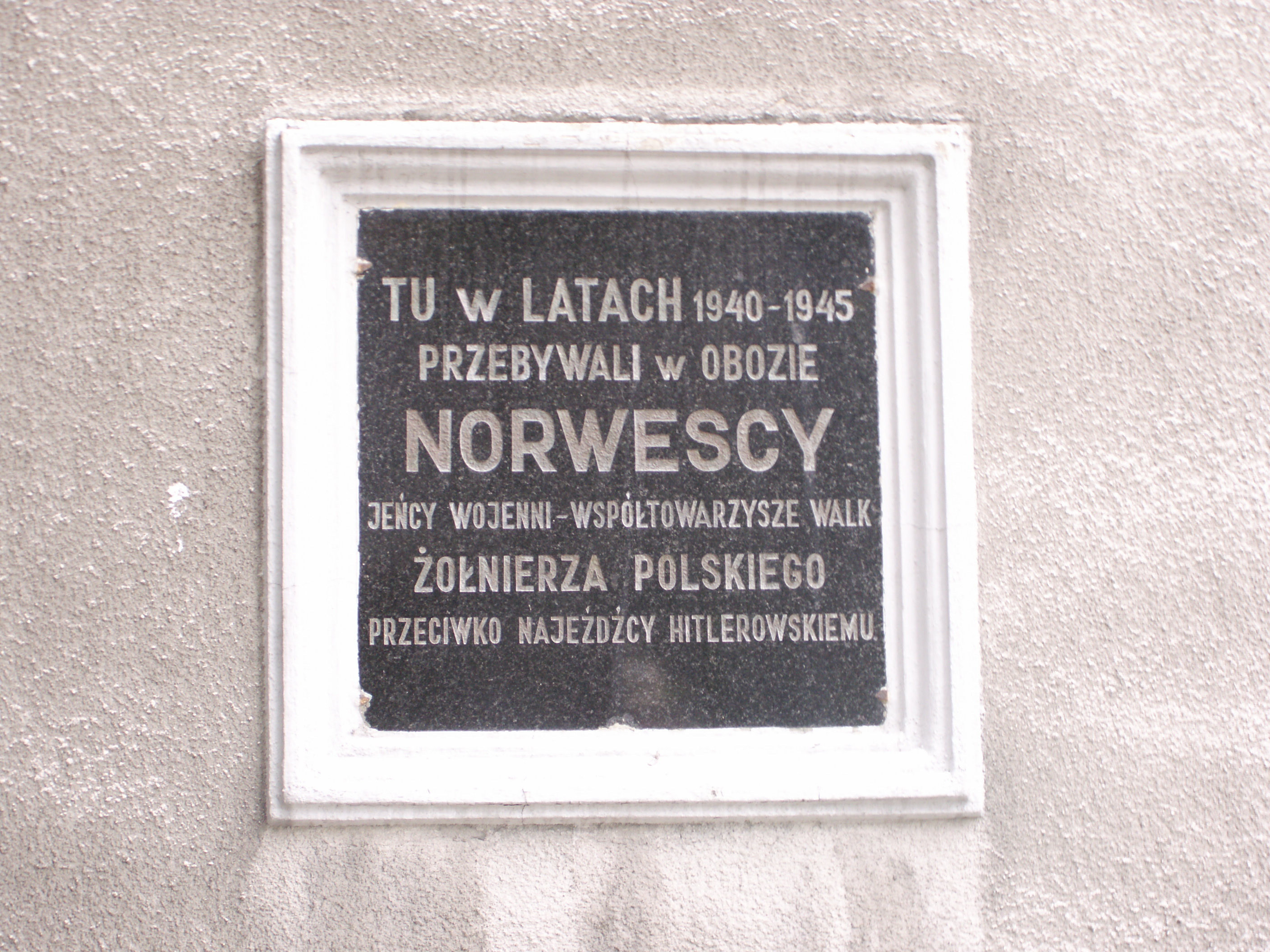 Tablica upamiętniająca pobyt norweskich jeńców podczas II wojny światowej w Ostrzeszowie.